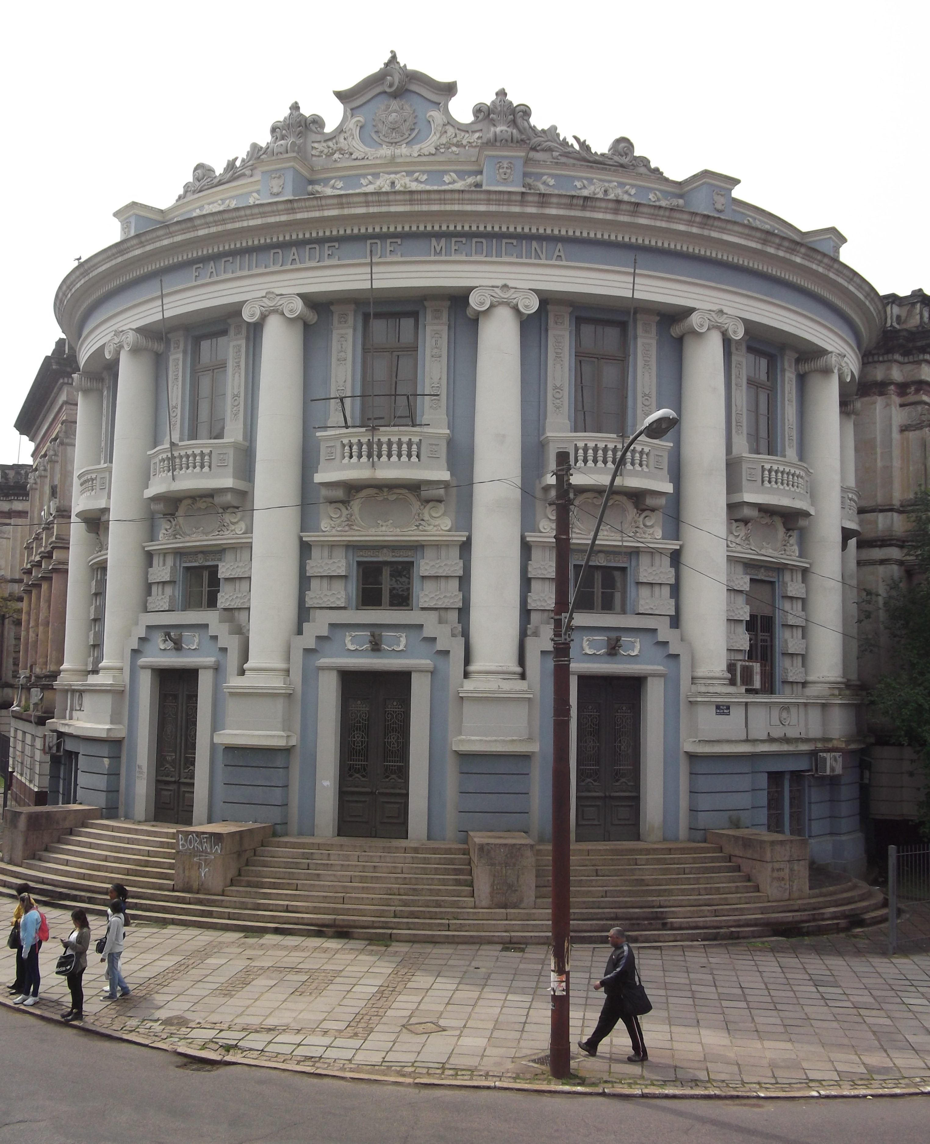 Antiga Faculdade de Medicina da Universidade Federal do Rio Grande do Sul